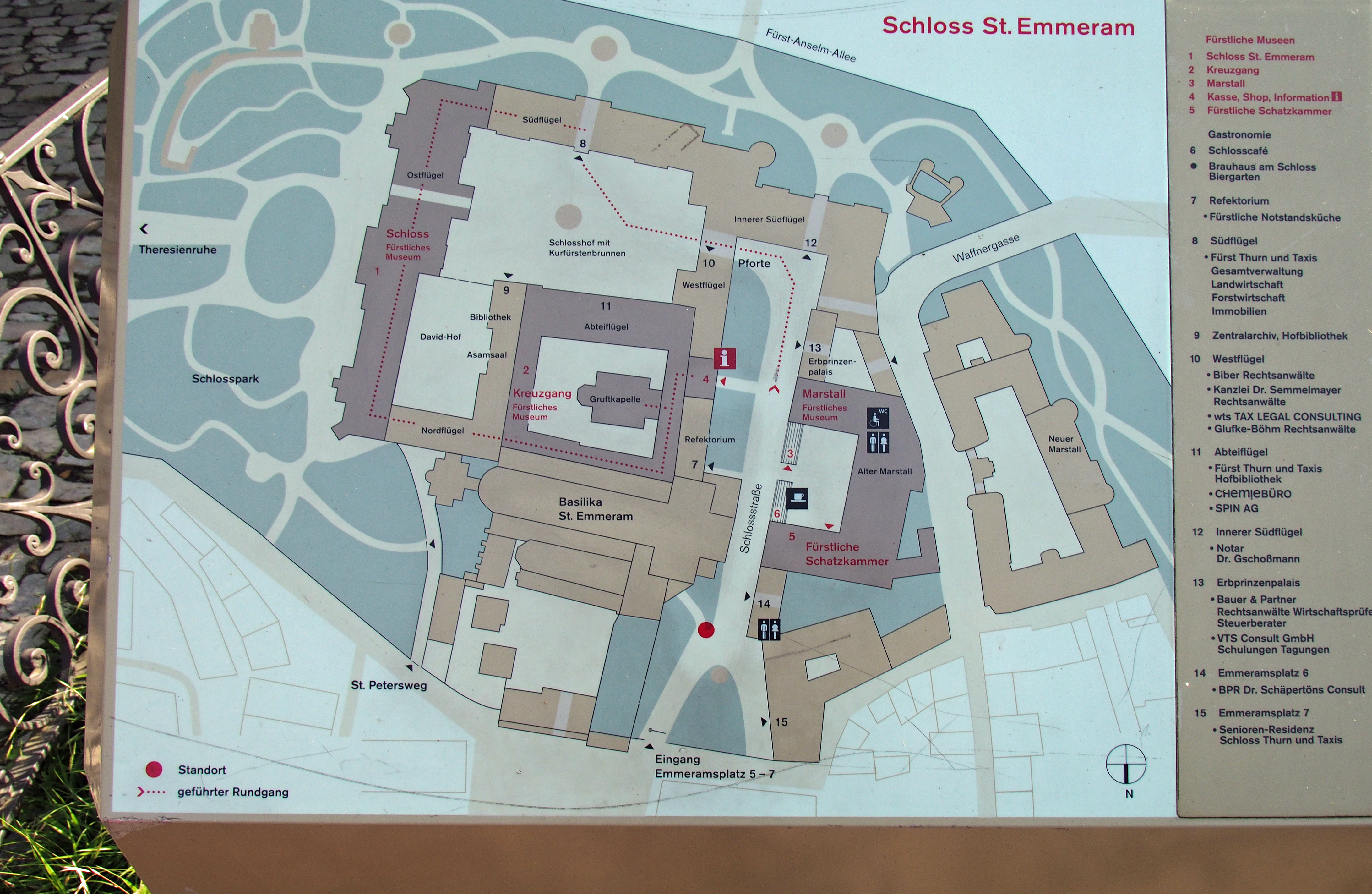 Infoplan Schloss Emmeram mit Abtei, Basilika, Marstall, Schatzkammer u.a.